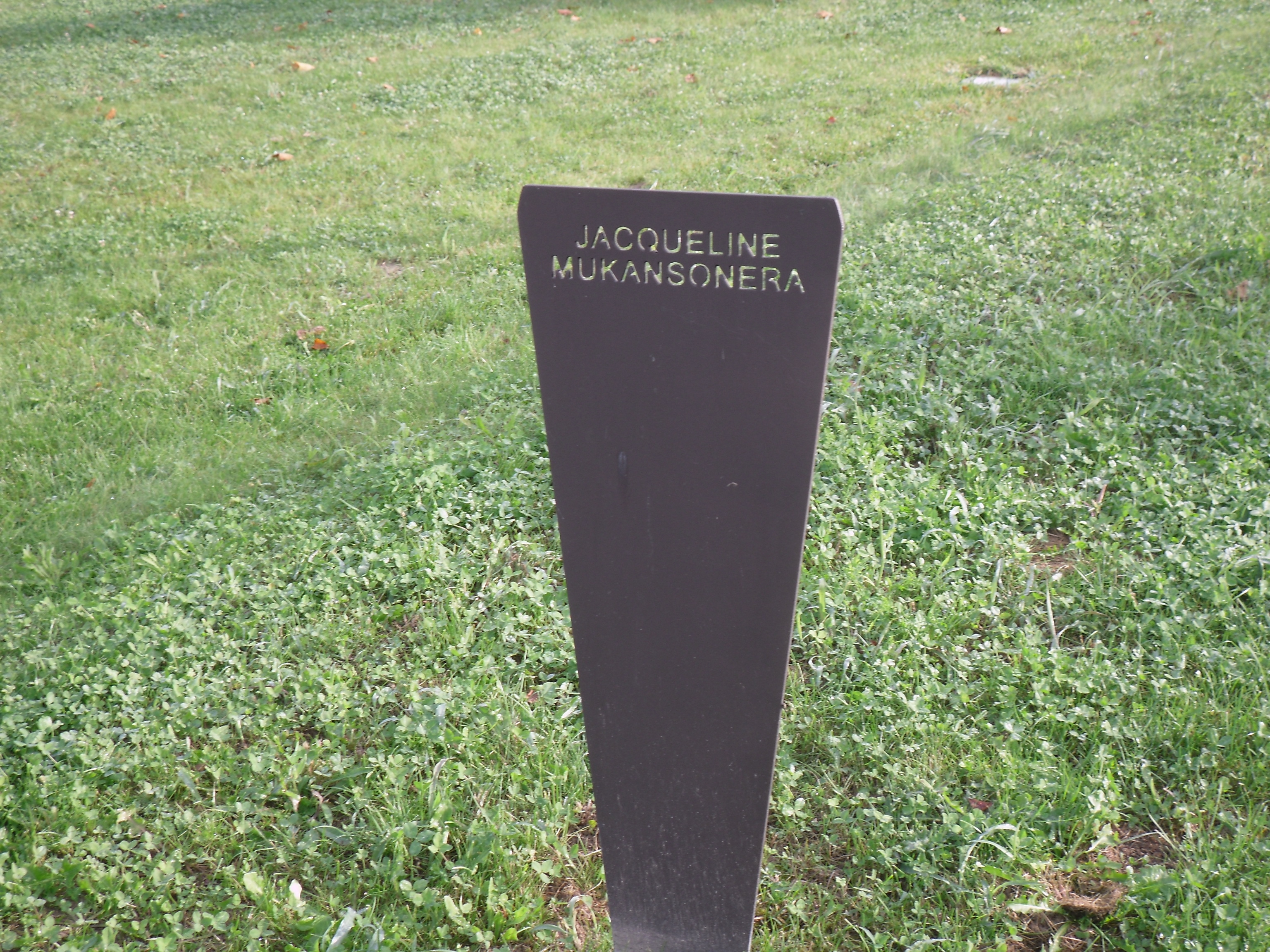 Giardino dei Giusti del Mondo di Padova. Stele dedicata a Jacqueline Mukansonera.